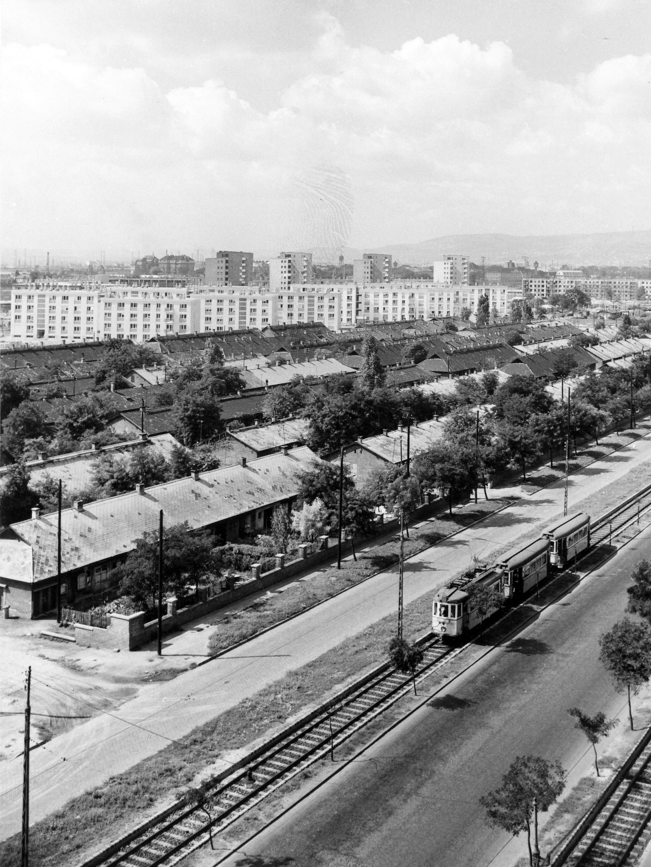 A kép forrását kérjük így adja meg: Fortepan / Budapest Főváros Levéltára. Levéltári jelzet: HU_BFL_XV_19_c_11 Location: Hungary Tags: Budapest Title: A kép forrását kérjük így adja meg: Fortepan / Budapest Főváros Levéltára. Levéltári jelzet: HU_BFL_XV_19_c_11